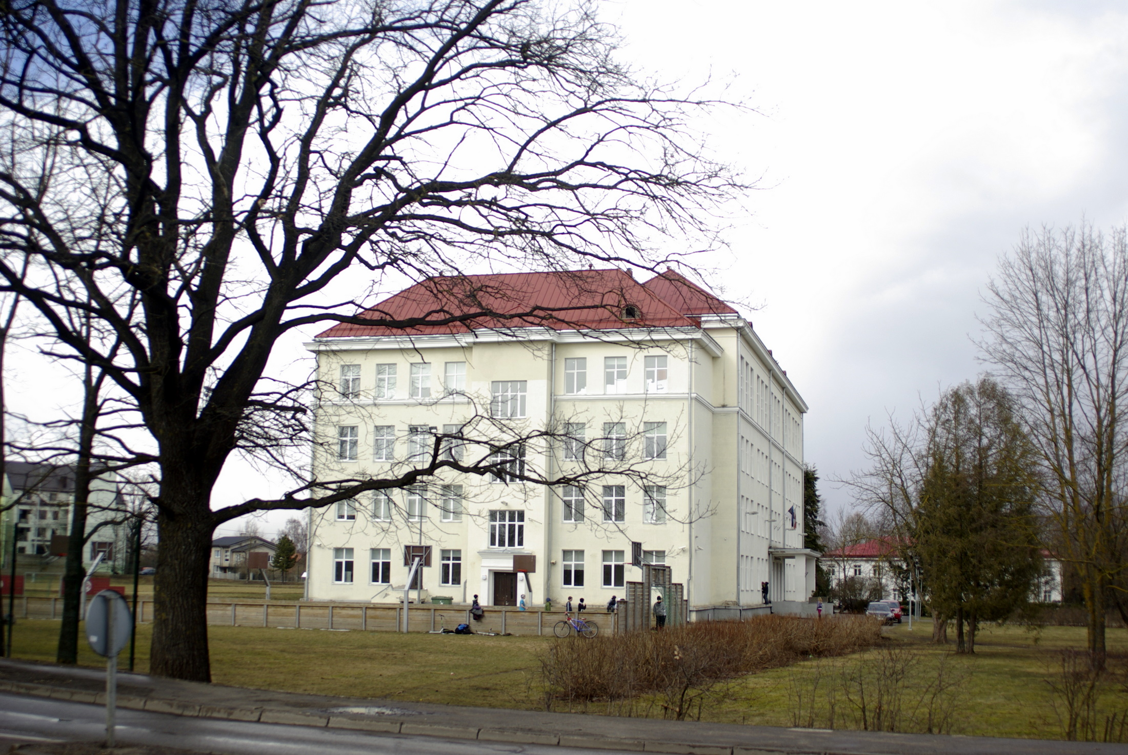 Forseliuse gümnaasium vaadatuna Teguri tänava poolt.